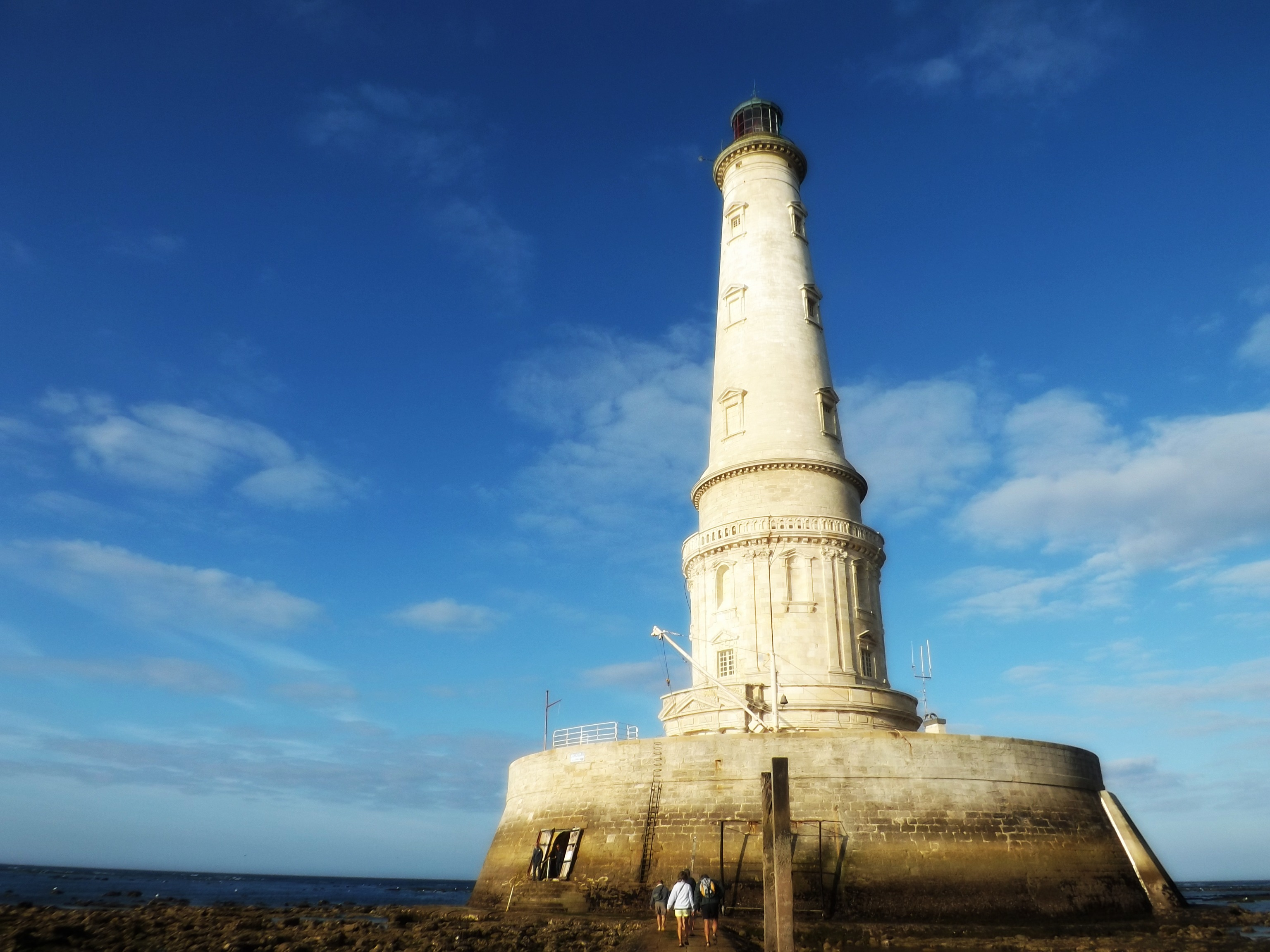 Le phare de Cordouan à marée basse en septembre 2013. This building is indexed in the Base Mérimée, a database of architectural heritage maintained by the French Ministry of Culture, under the references PA00083858 and IA33001224 .